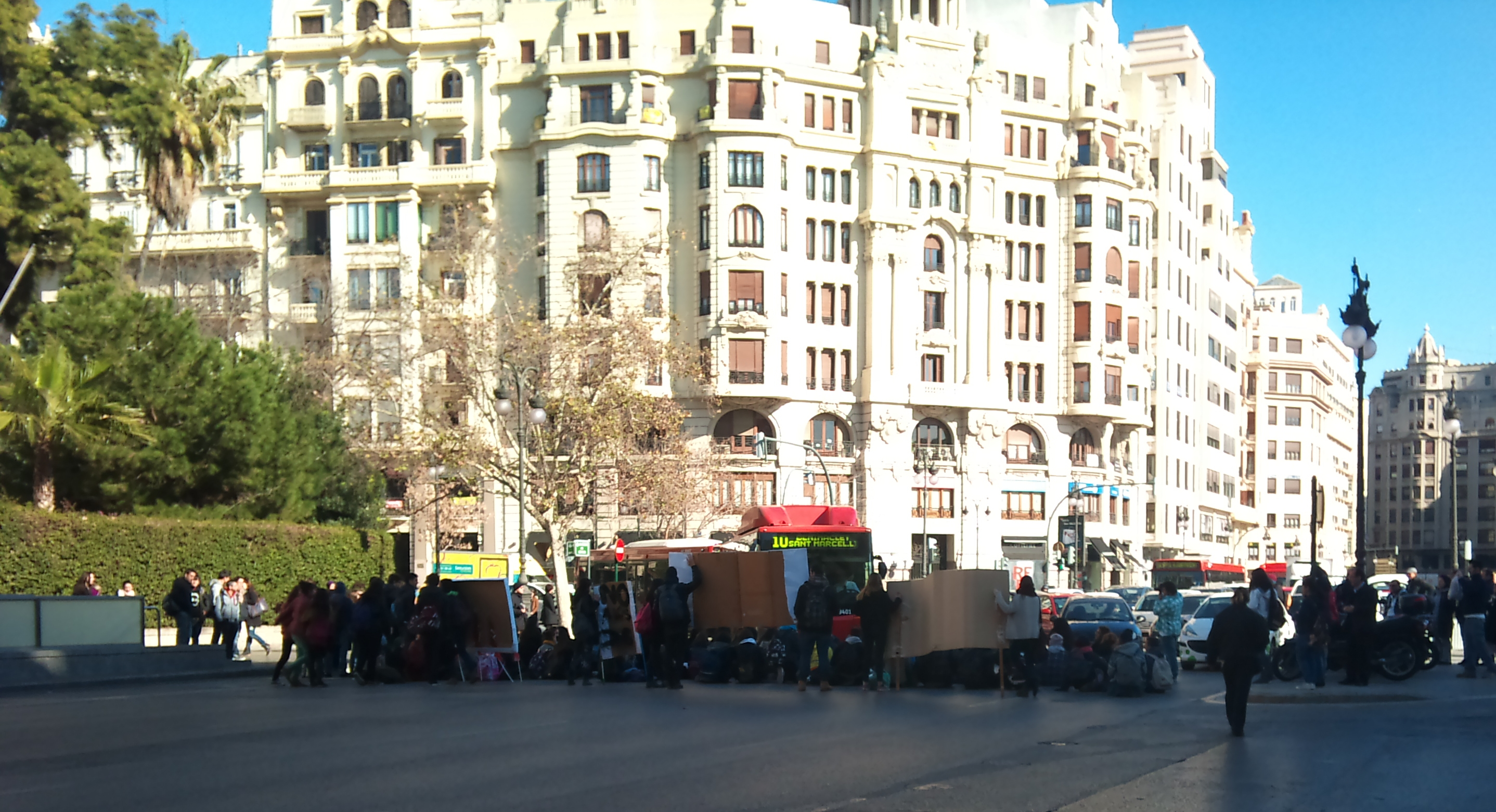 Imatge del tall de trànsit causat per la protesta contra els retalls en educació dels alumnes de l'IES Lluís VIves el 13 de febrer de 2012, que desencadenaren la "Pirmavera Valenciana"